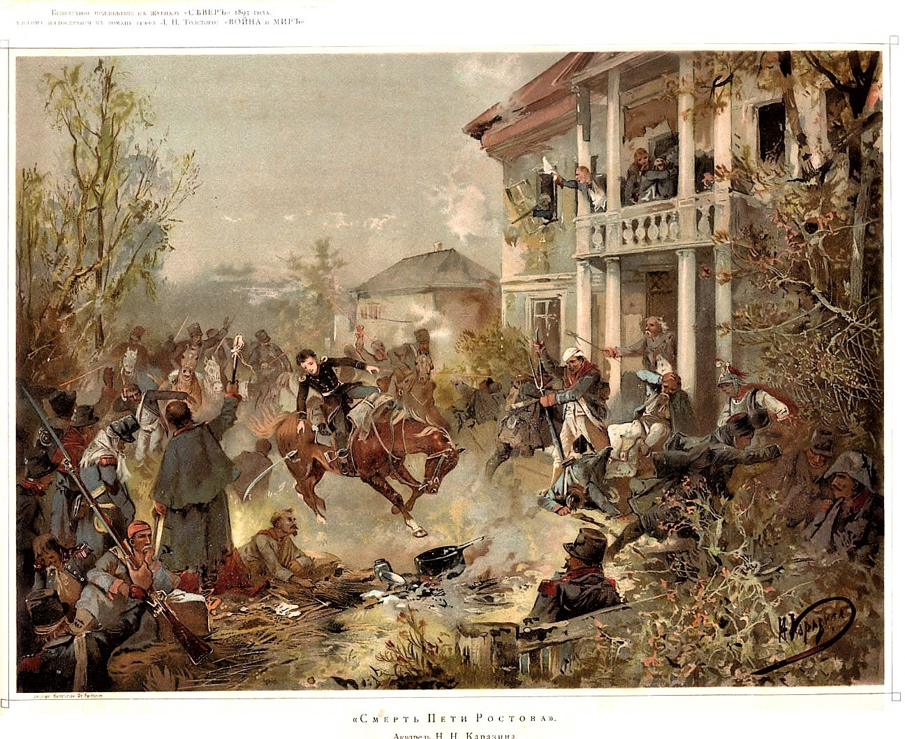 Смерть Пети Ростова Акварель Н.Н. Каразина